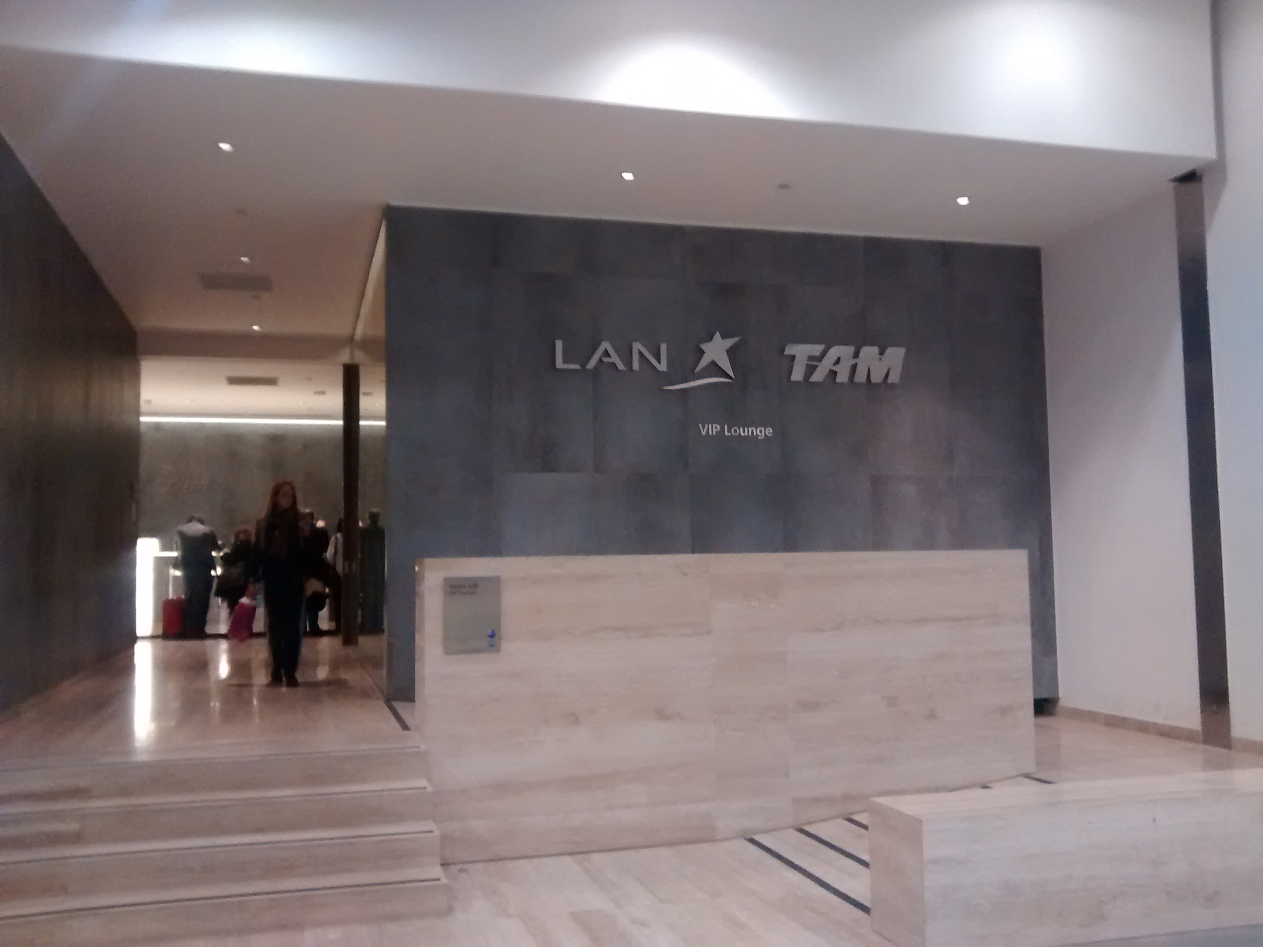 VIP Lounge de LAN Airlines en el Aeropuerto Internacional Comodoro Arturo Merino Benitez de Santiago de Chile.